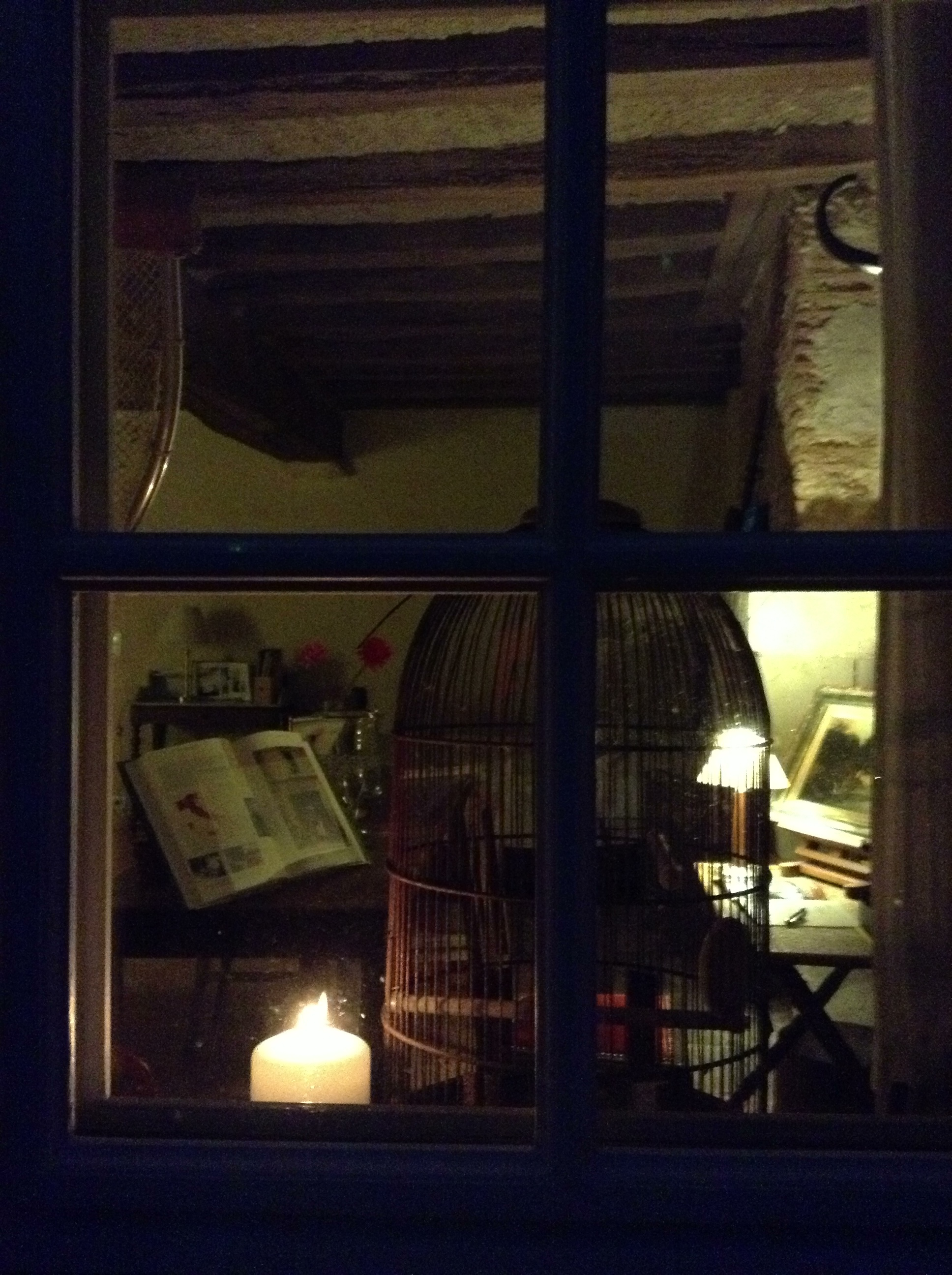 Chateau Bois-Briand Nantes Communs